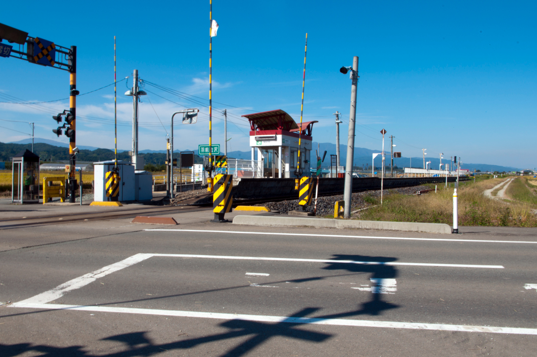 東日本旅客鉄道左沢線羽前金沢駅